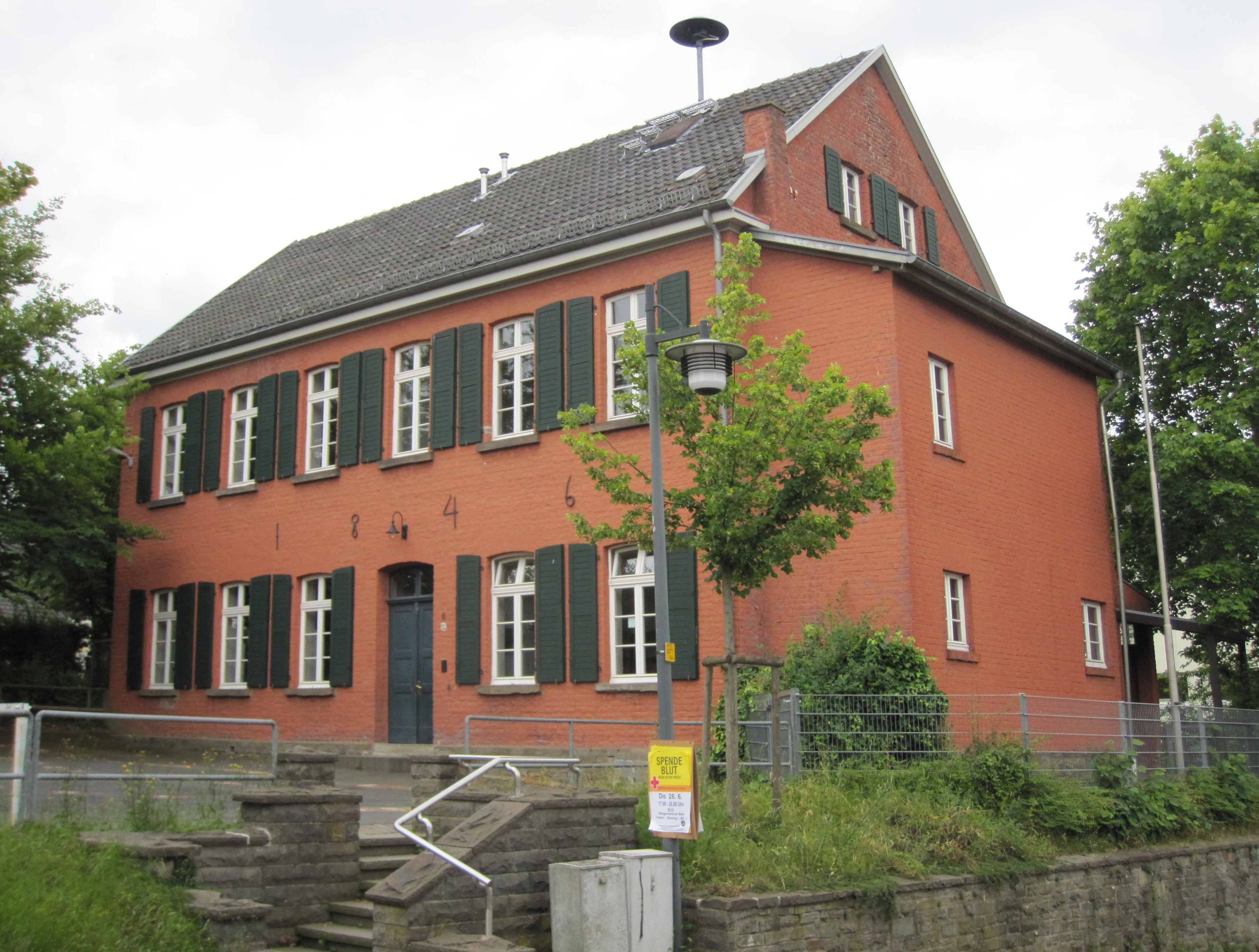 Inger Birker Straße 8 Schulgebäude